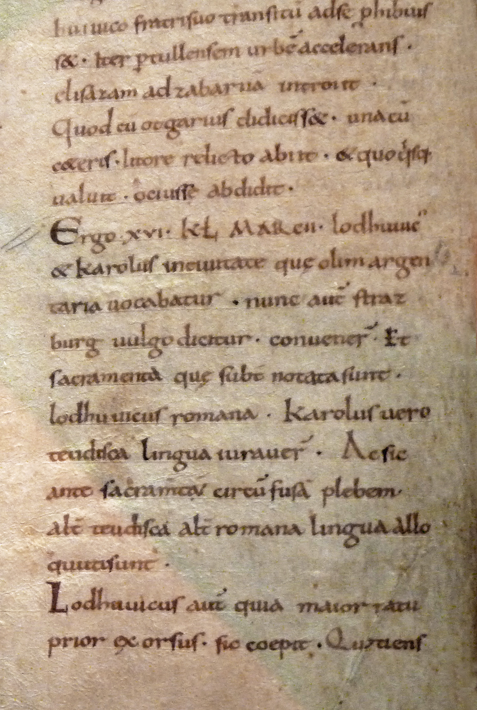 Serments de Strasbourg (842). Connus à travers la copie réalisée à Soissons au Xe siècle, présentée dans le cadre d'une exposition au Musée historique de Strasbourg en 2012.